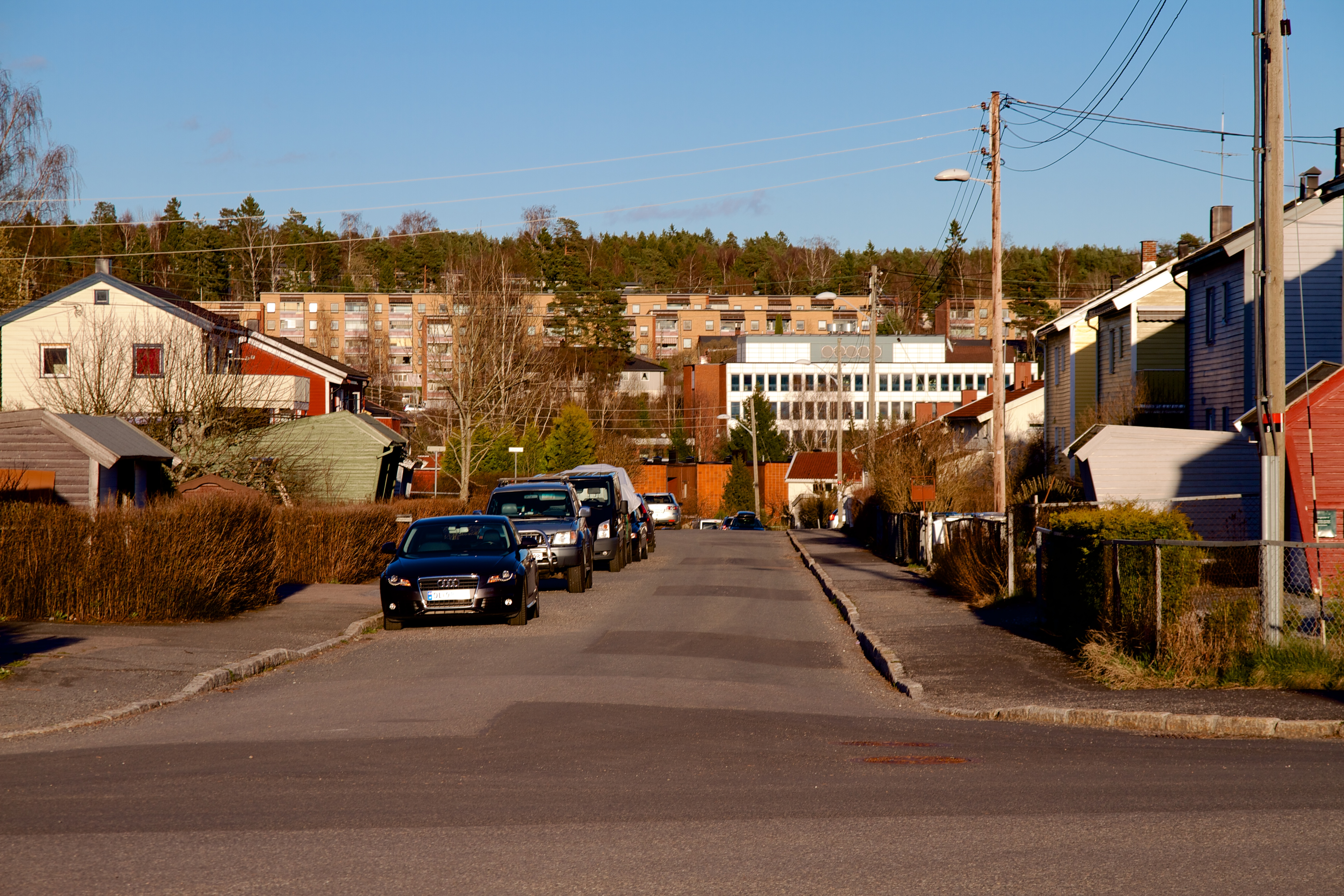 Kringkollen på Bøler i Oslo.